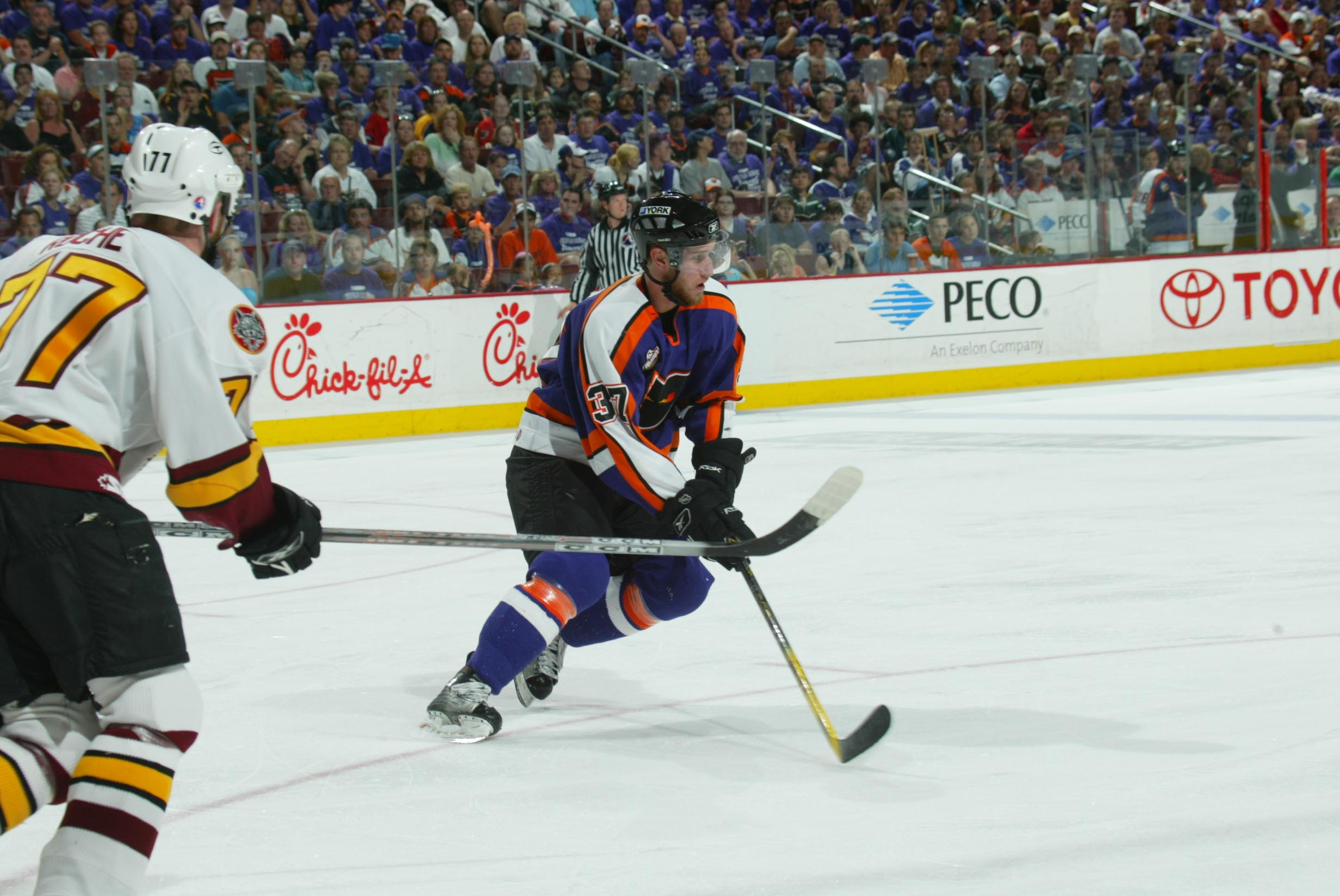 Photo: Bruce Bennett/AHL